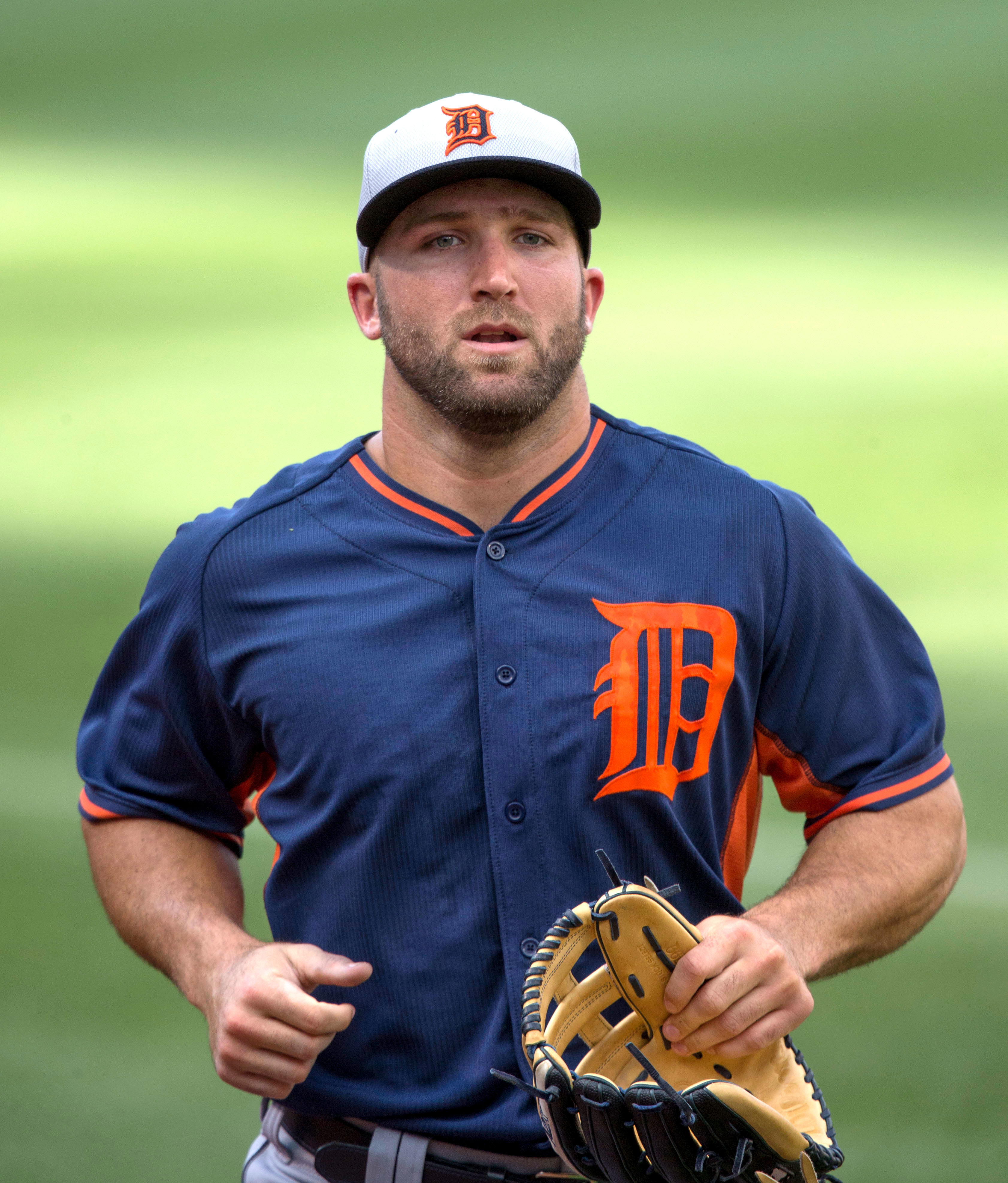 Tyler Collins